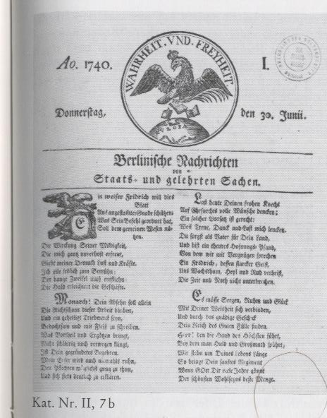 1740 Berlinische Nachrichten - zdjęcie okładki